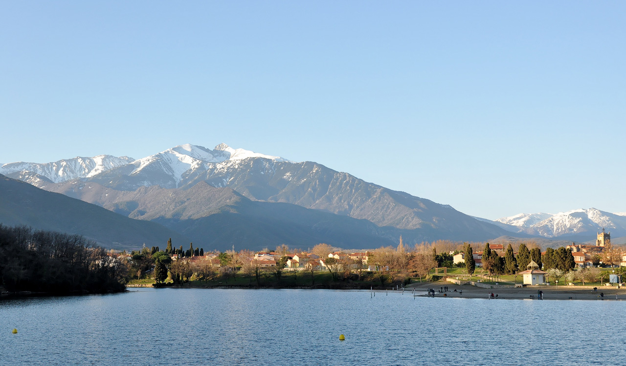 Les Pyrénées enneigées vues de Vinça 66320 France